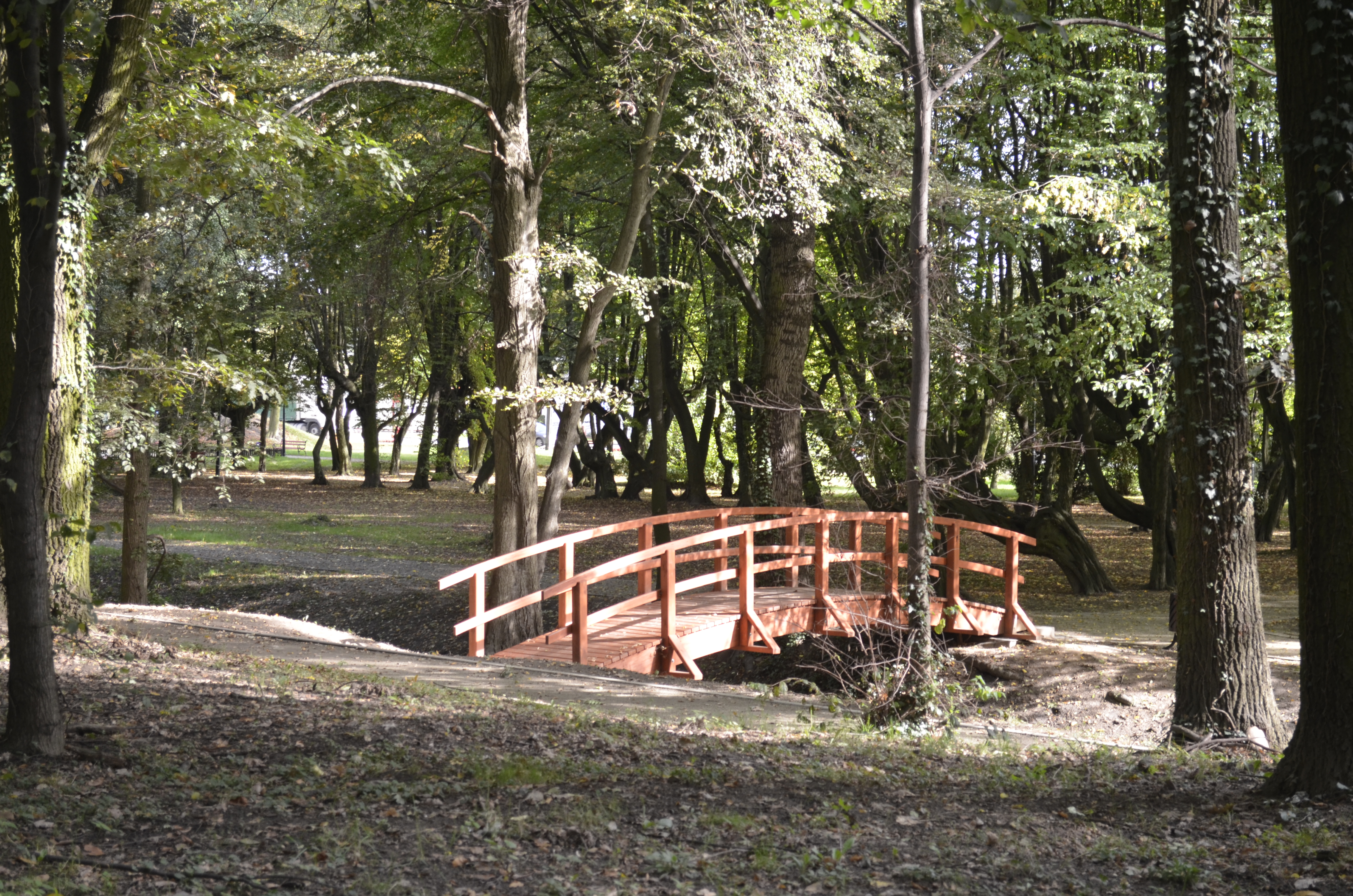 Kargowa - park, 1730-1731, kon. XIX